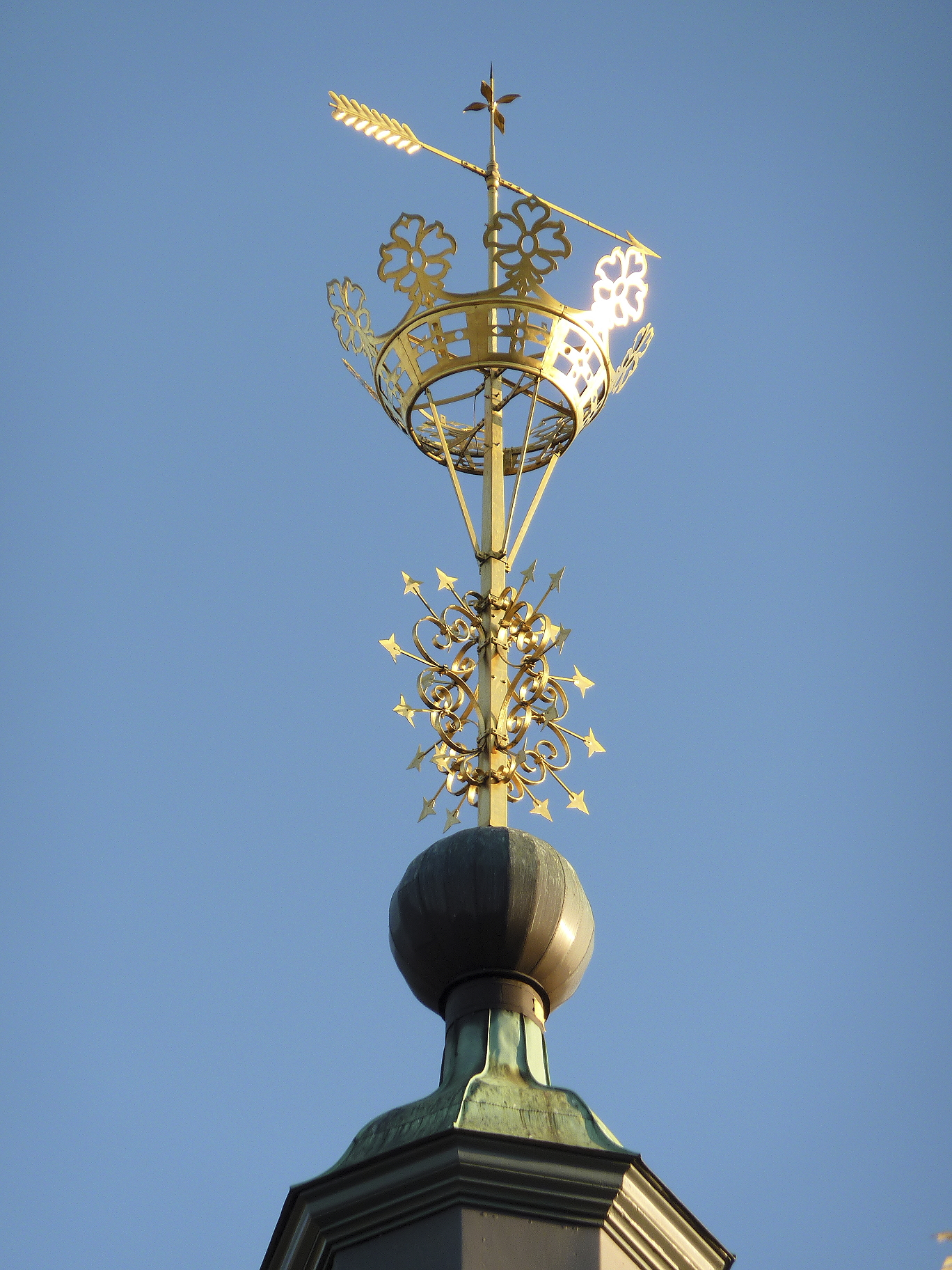 Stadt Siegen, Nordrhein-Westfalen: Die evangelische Nikolaikirche, erbaut im 13. Jahrhundert, ist nach der Martinikirche der zweitälteste Kirchenbau der Stadt. Der Kirchturm trägt auf seiner Spitze seit dem Jahr 1658 das Wahrzeichen der Stadt, das Krönchen. Seit 1993 ist die Skulptur auf der Kirchturmspitze ein Replikat aus vergoldetem Edelstahl; das Original wurde aus konservatorischen Gründen witterungsgeschützt im Portalbereich aufgehängt